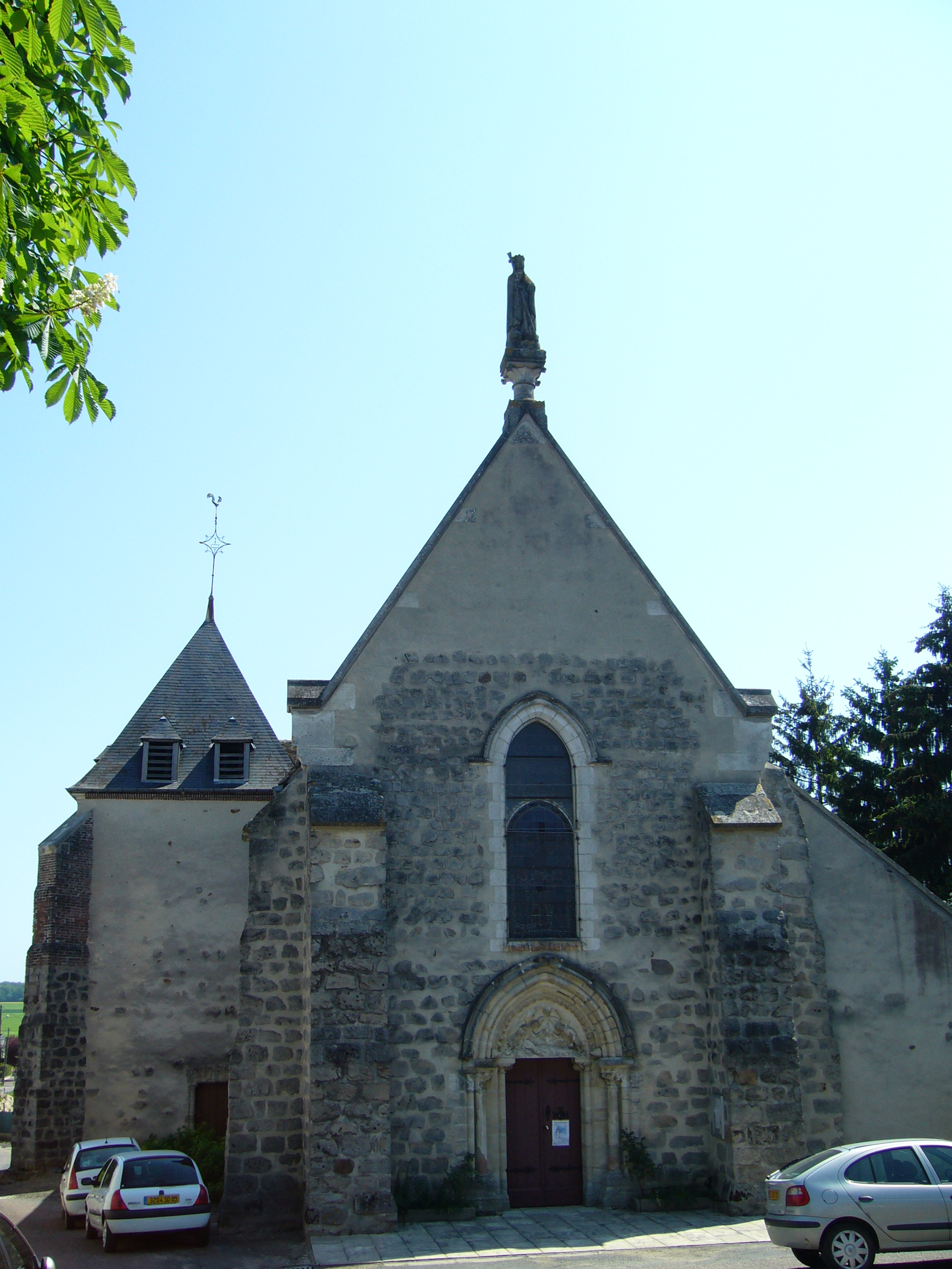 Église Notre-Dame-de-l'Assomption de Cudot